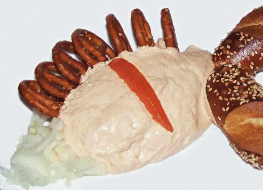 eine Portion Spundekäs mit einer etwas ungewöhnlichen Laugenbrezel